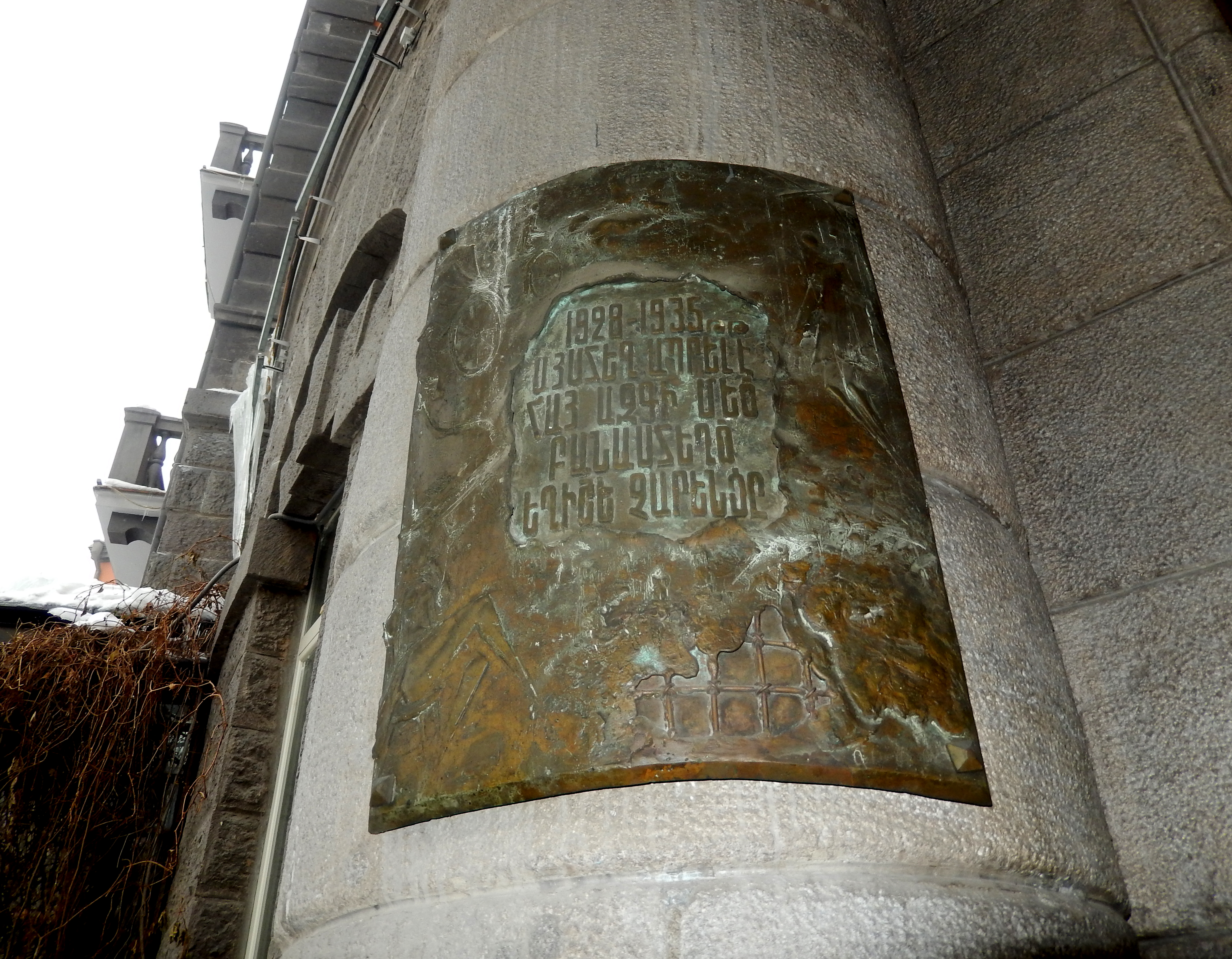 Plaque on Goldern Tulip hotel, Yerevan